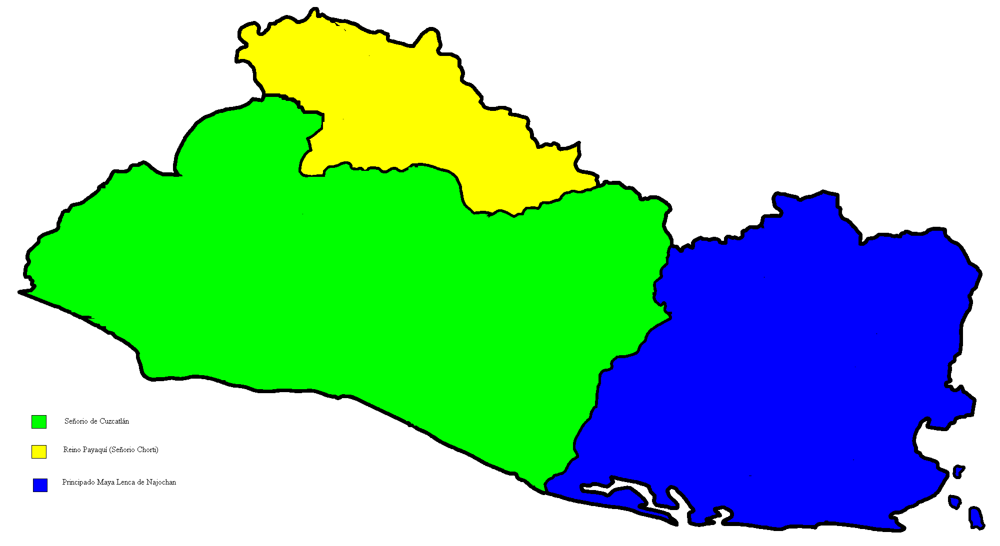 Este archivo fue creado copiando de wikicommons Image:El_Salvador_departments_blank.png y luego editado en el programa paint. fue hecho por y a la hora--Juan Miguel 17:06 16 jul 2006 (CEST)